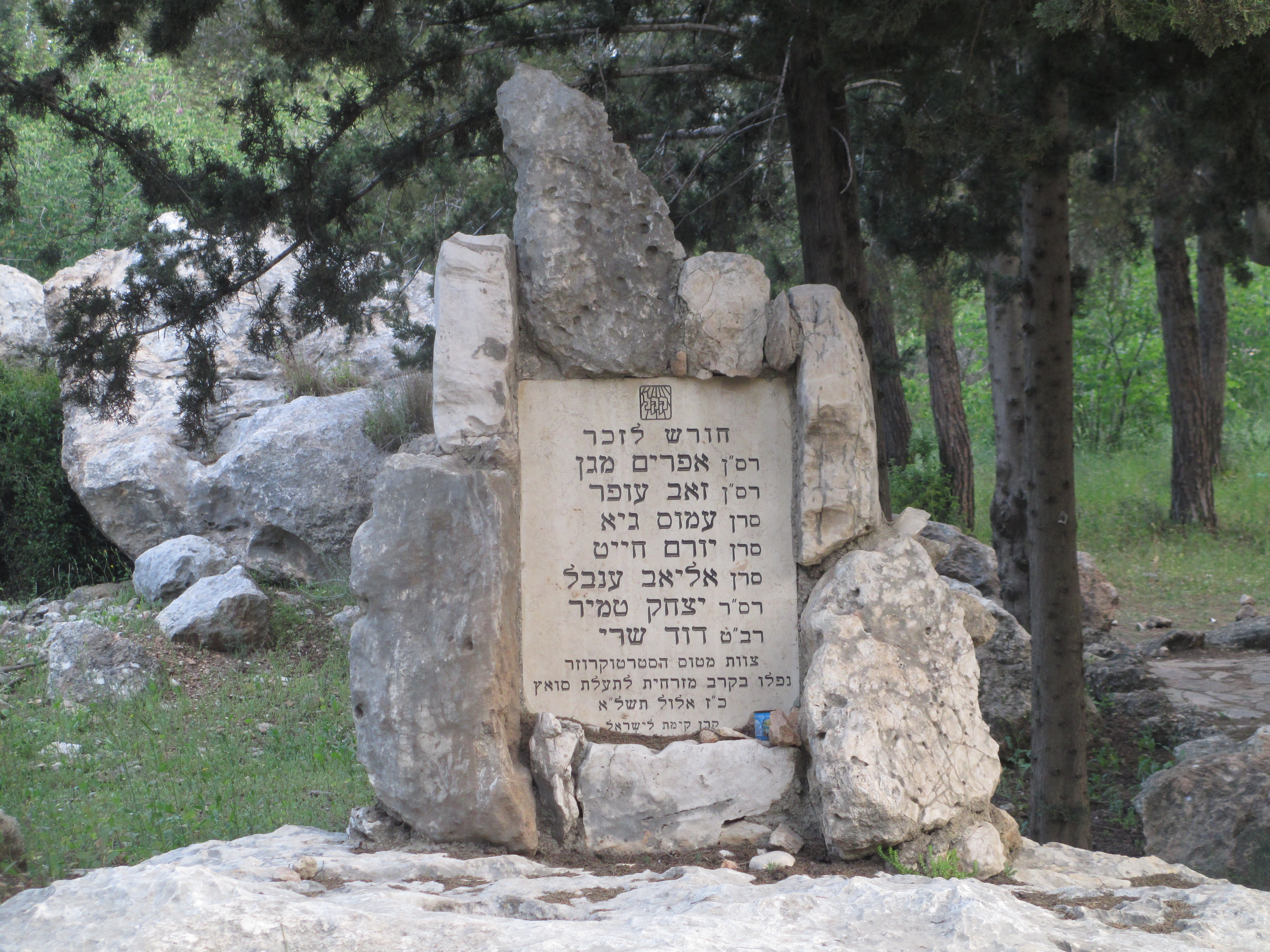 אנדרטה ביער בן שמן ל-7 אנשי צוות מטוס סטרטוקרוזר של חיל האוויר שהופל בסיני ב-17/9/71.